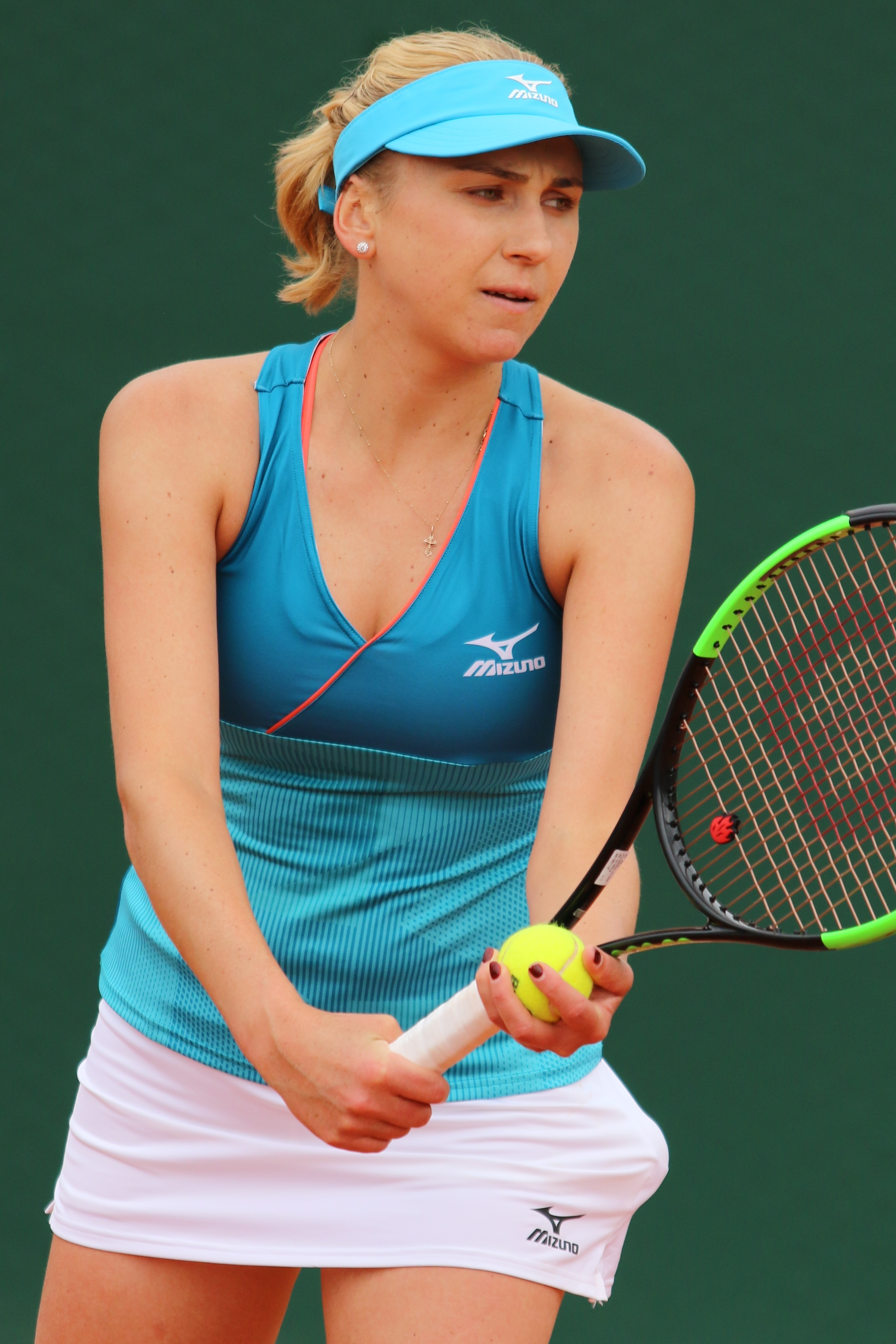 Kichenok L. RG19 (44)